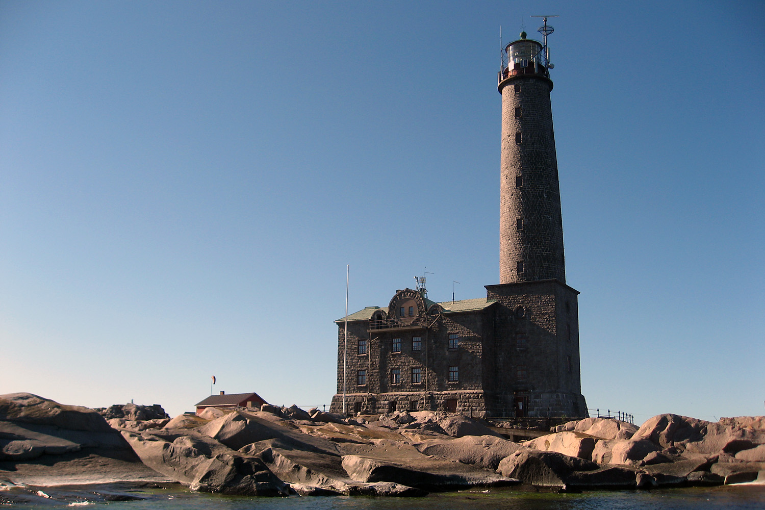 Bengtskär in summer 2007